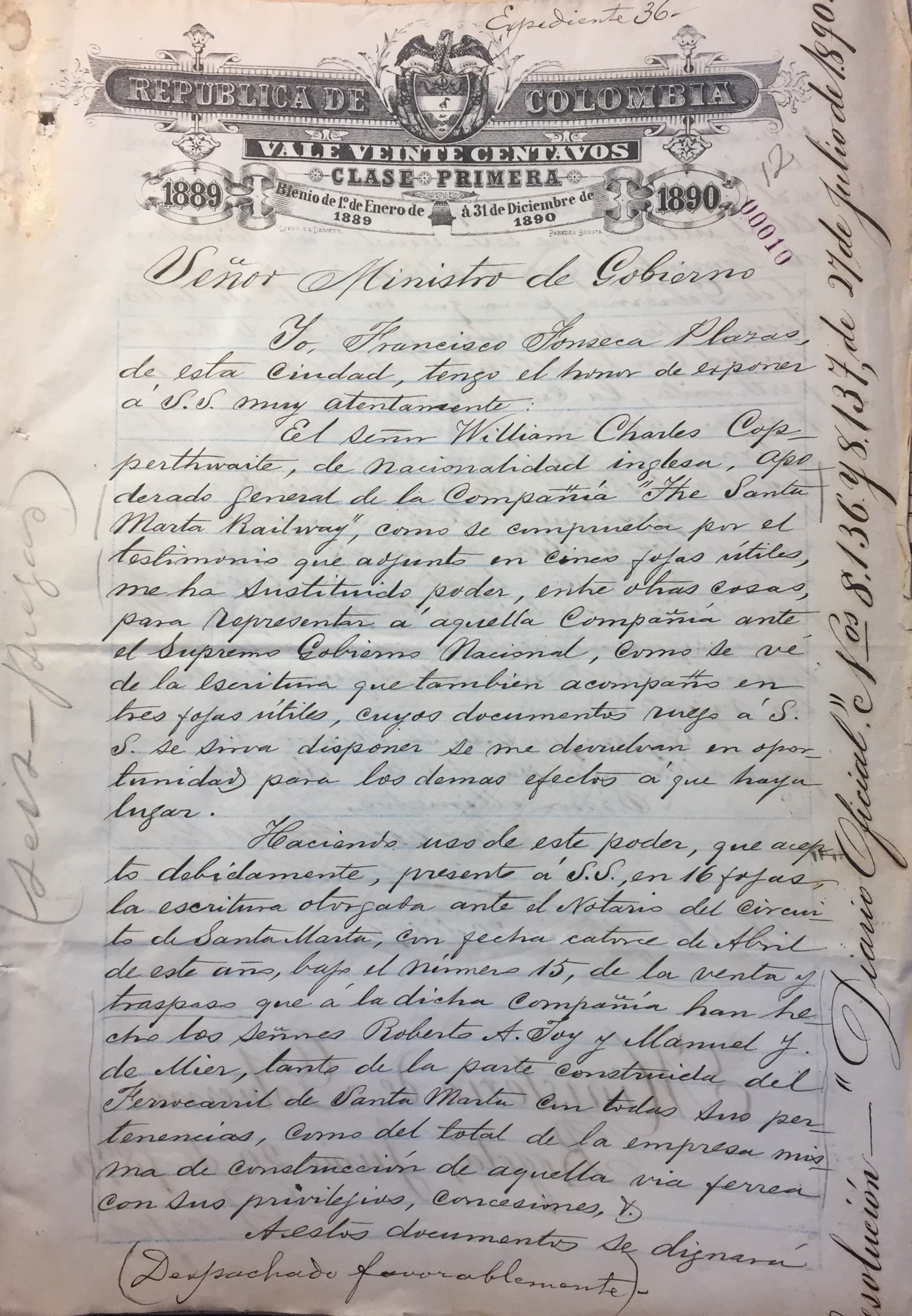 Comunicación de Francisco Fonseca Plazas, apoderado de la empresa, solicitando la personería jurídica la Ministerio de Gobierno. AGN